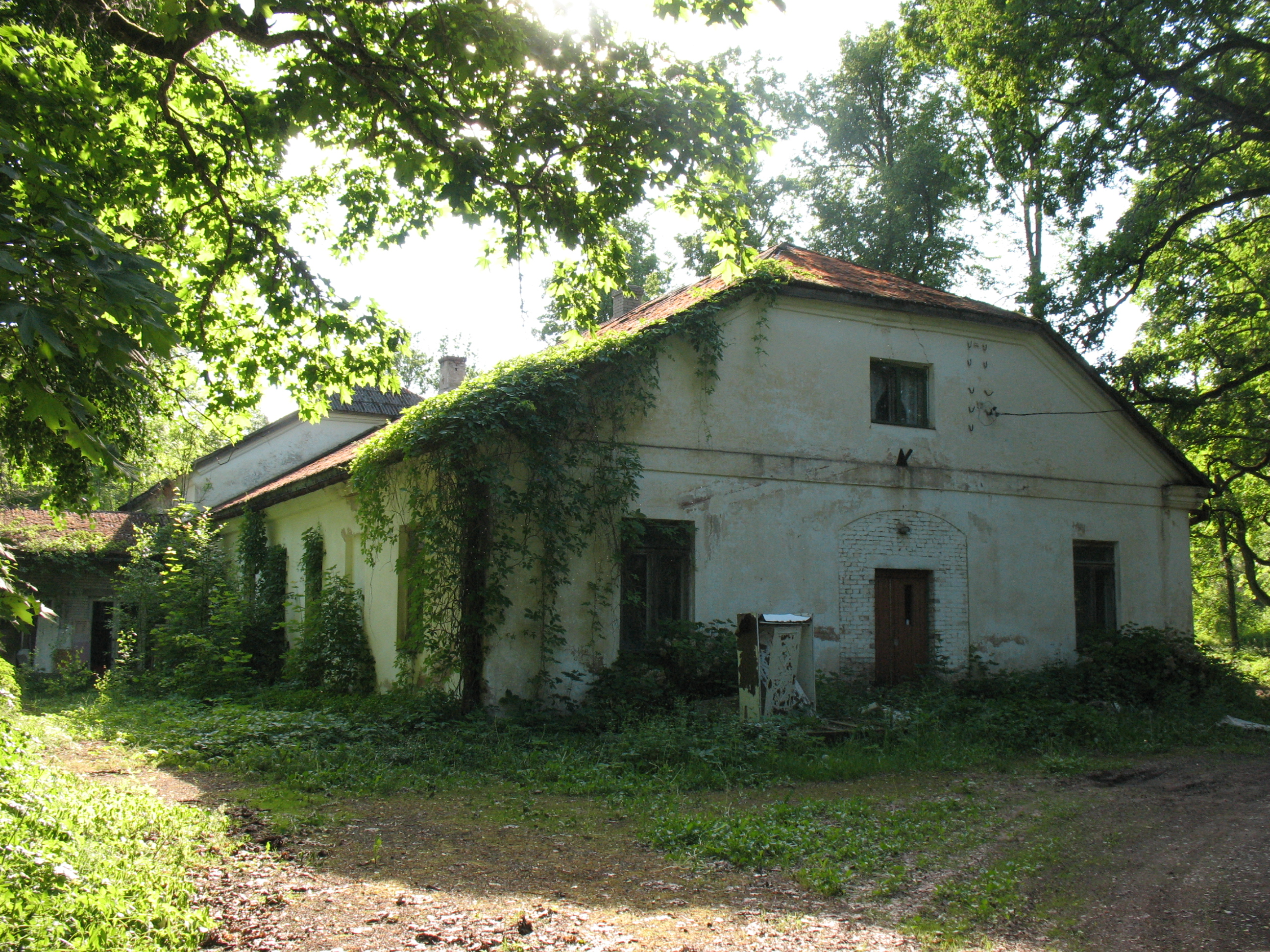 Tartu maakond, Konguta vald, Mälgi küla